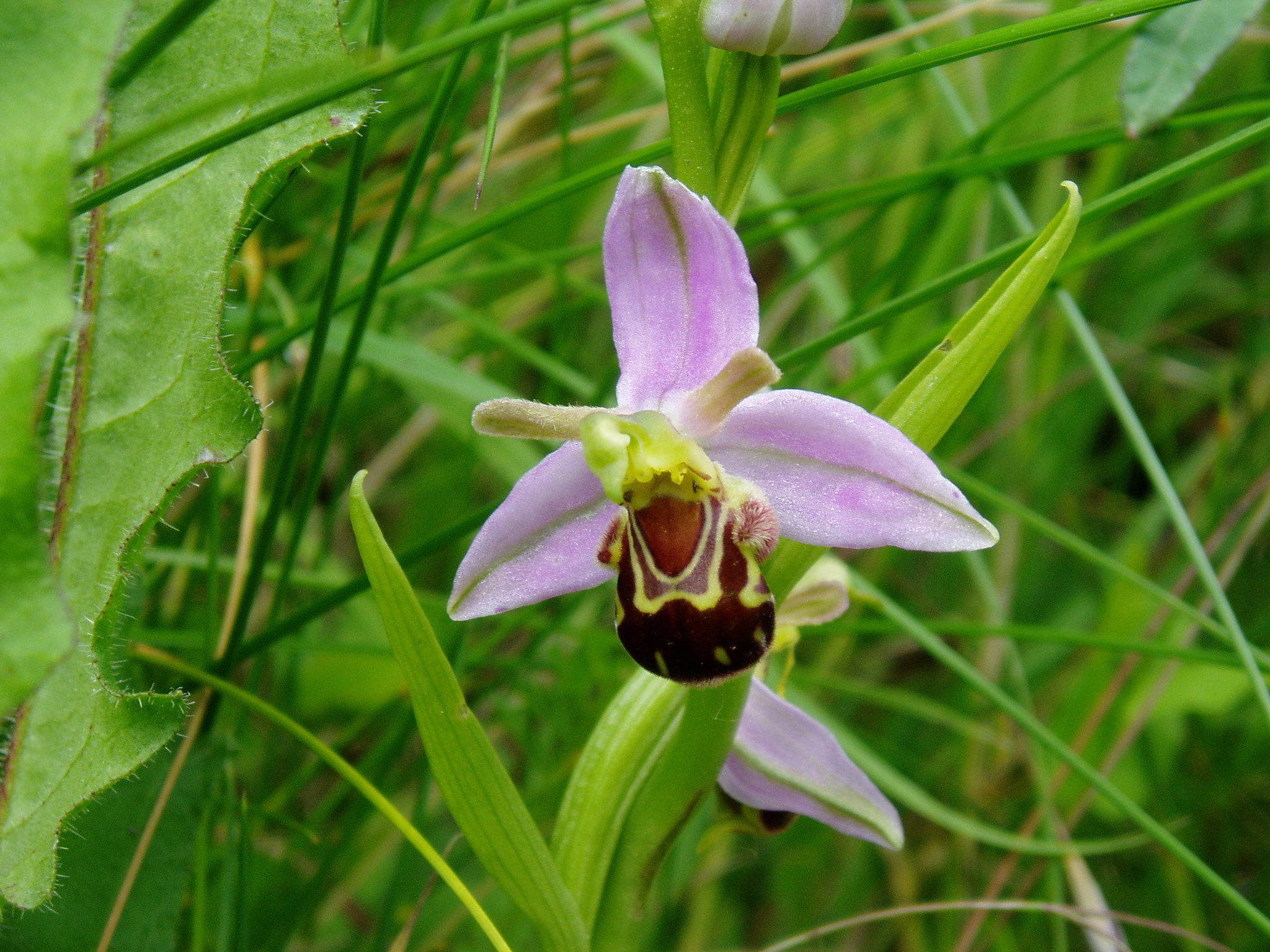 Ophrys apifera, orchys abeille.